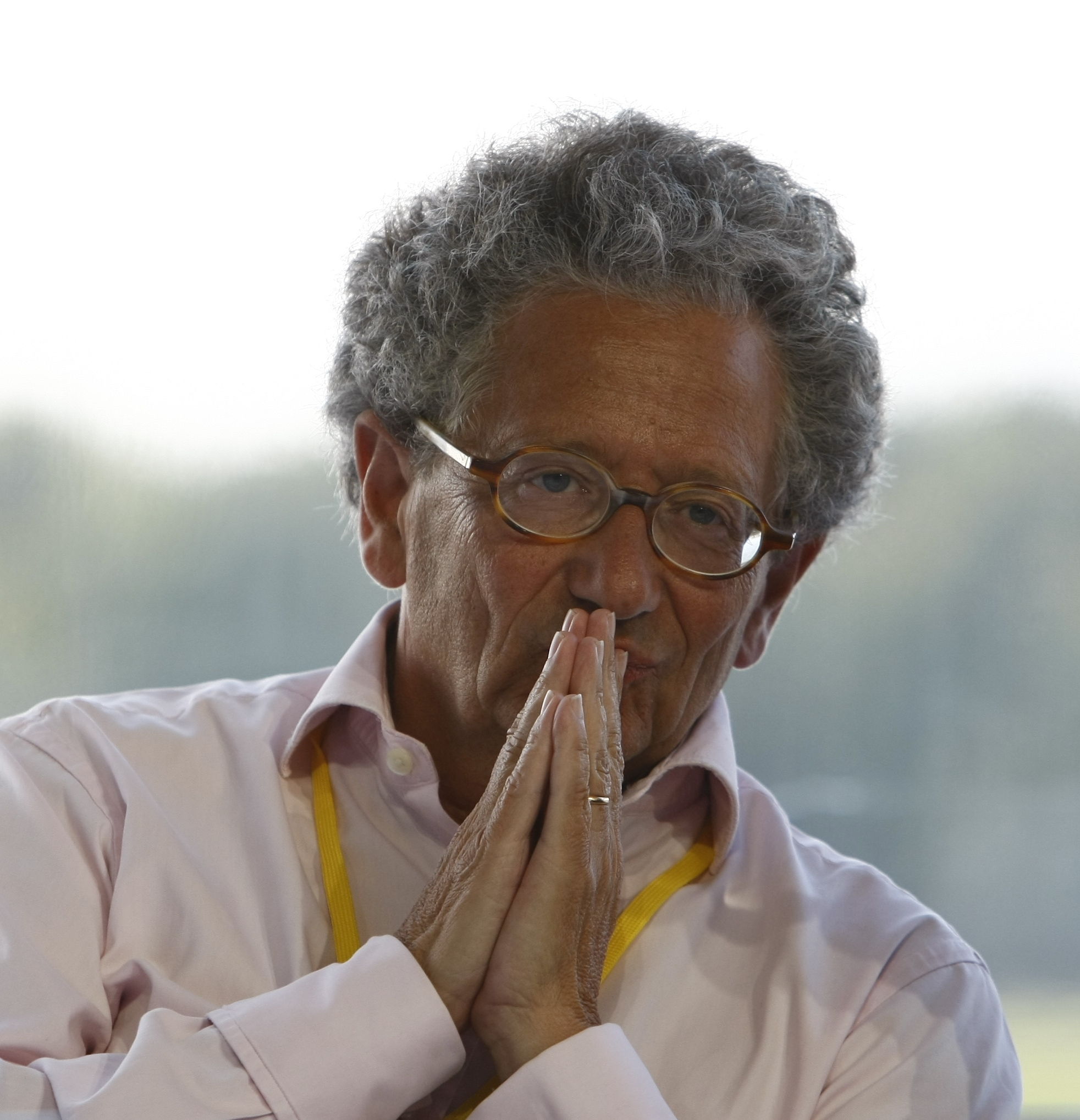 Dominique Moïsi, géopoliticien français